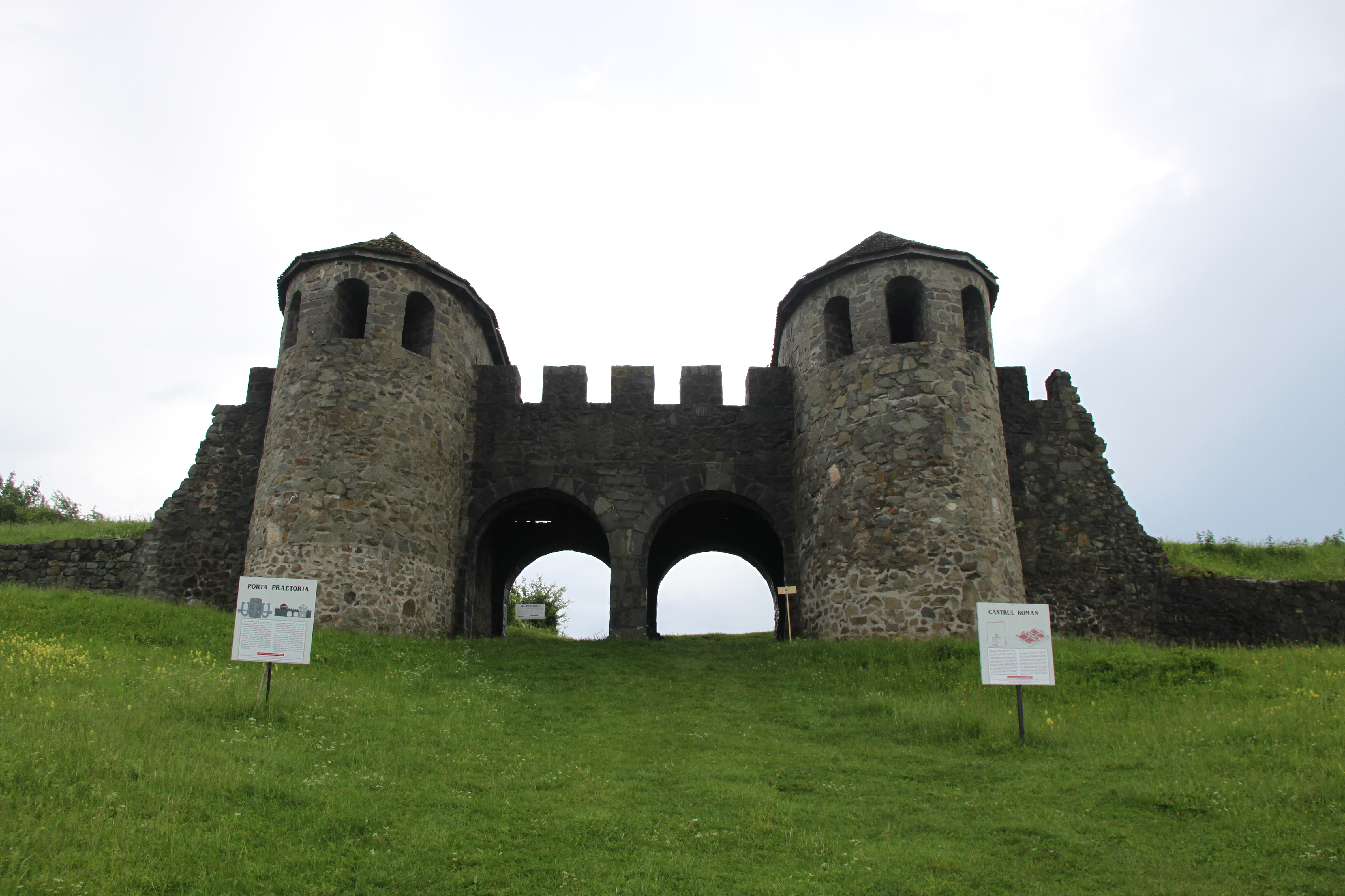 Salaj - Mai 2010